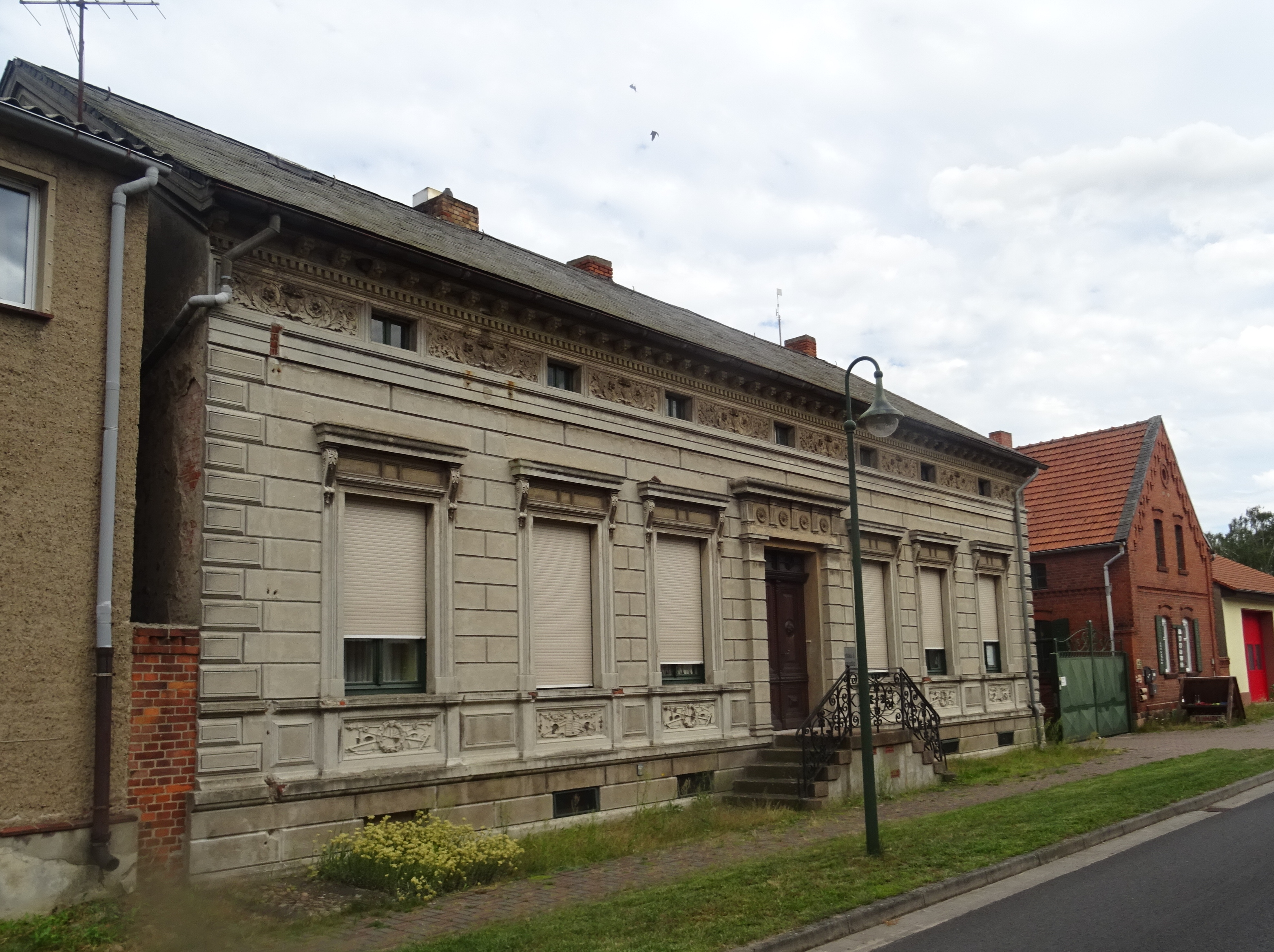 Bertingen, Gemeinde Angern, denkmalgeschützter Bauernhof Dorfst. 29